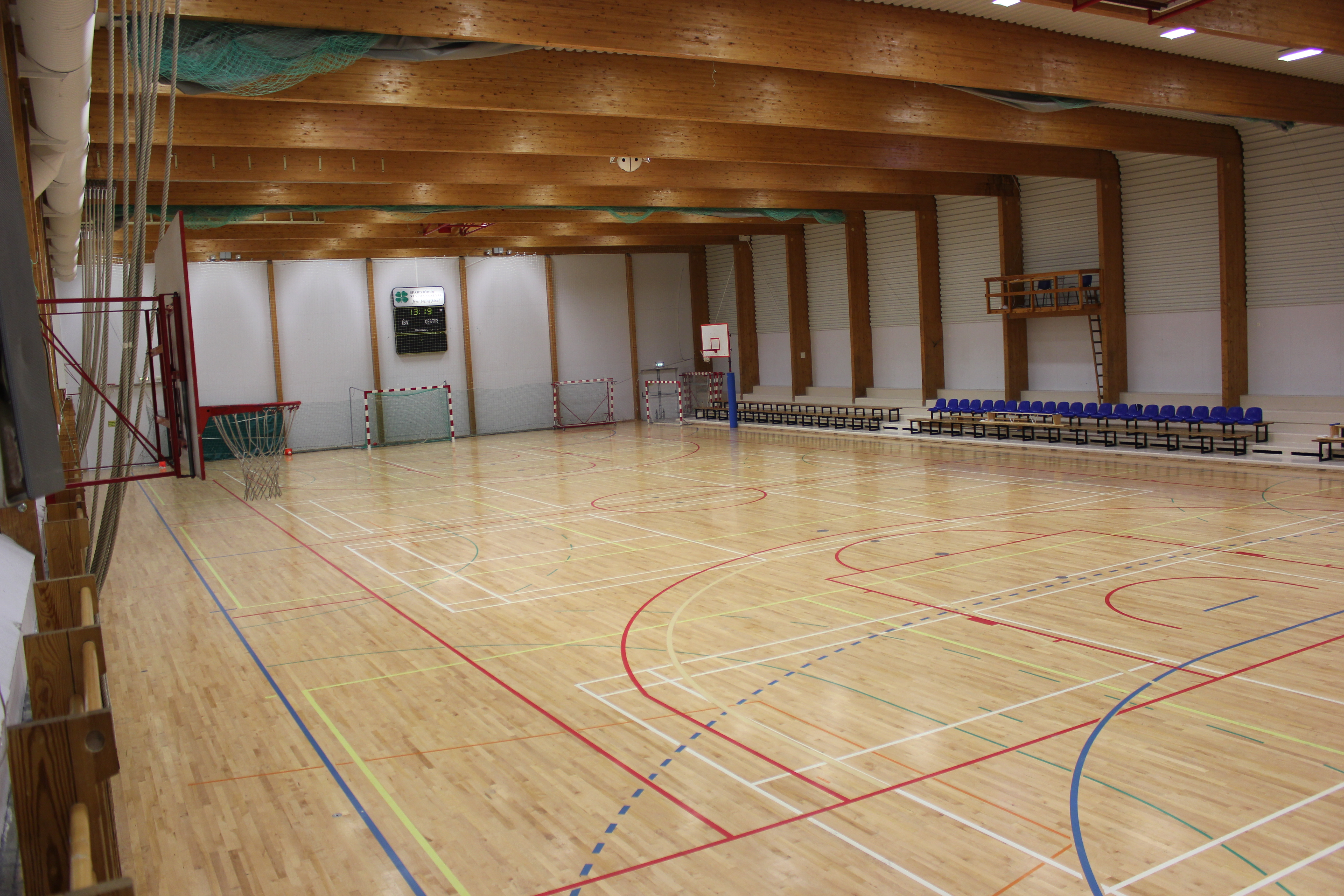 Gamli salurinn í Íþróttamiðstöðinni í Vestmannaeyjum. Aðal völlur ÍBV í handbolta og körfubolta